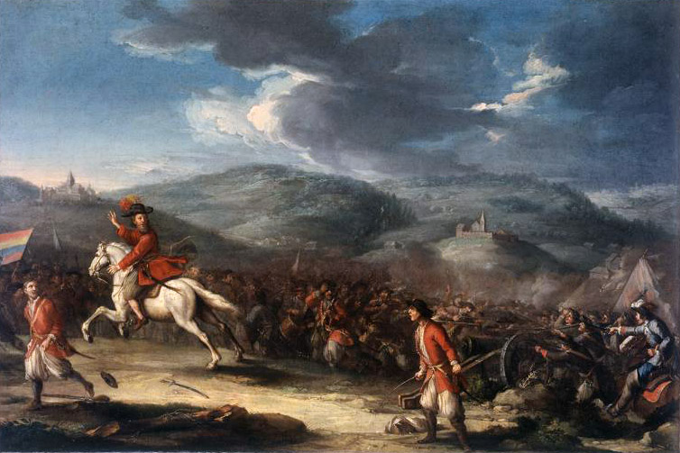 Flucht der Innerschweizer bei Villmergen AG am 25. Juli 1712. Aus Schloss Steinhof in Luzern. 64 cm x 96.5 cm Schweizerisches Landesmuseum, Zürich